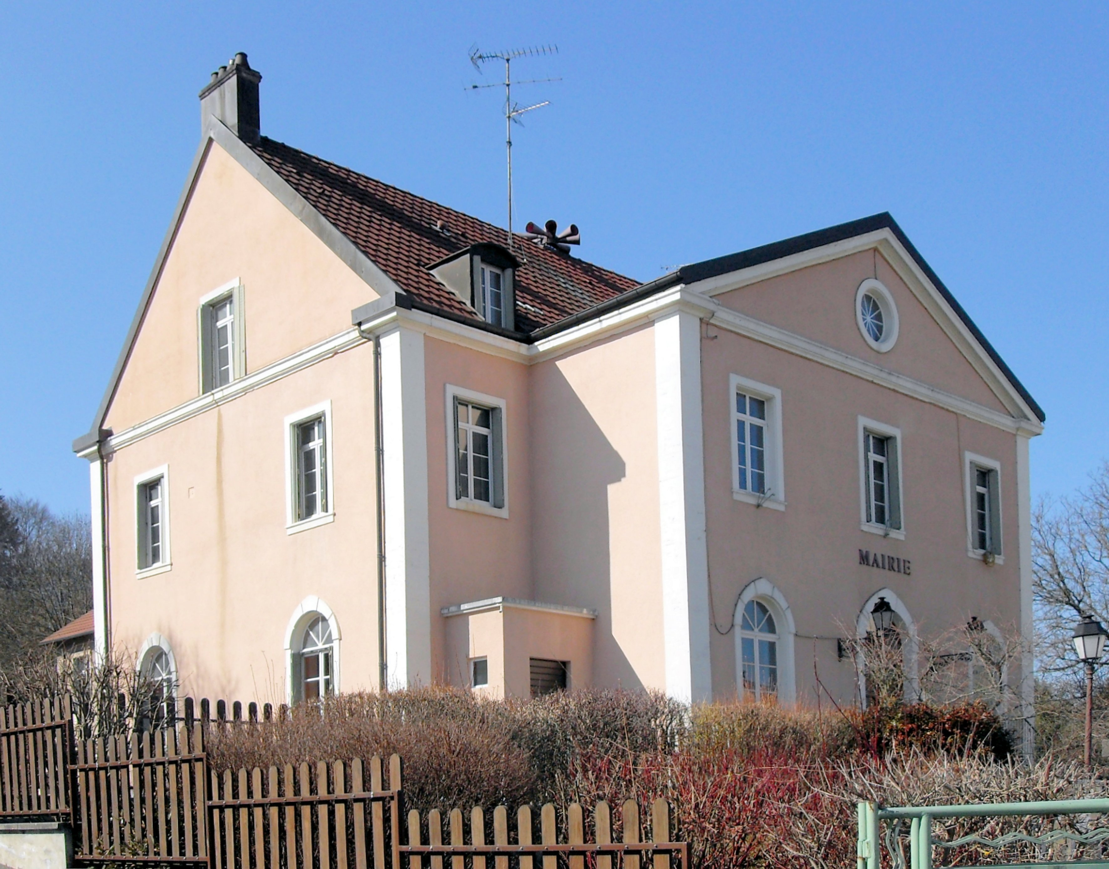 La mairie de Saint-Badevel